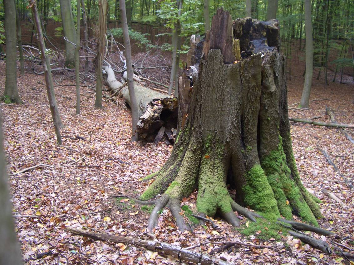 Conower Werder, Mecklenburg-Vorpommern.